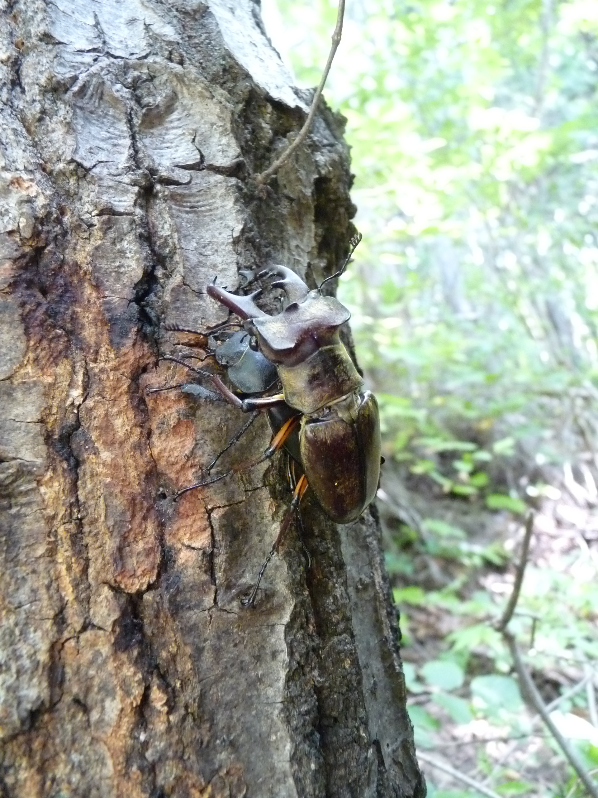 メイトガードするオス